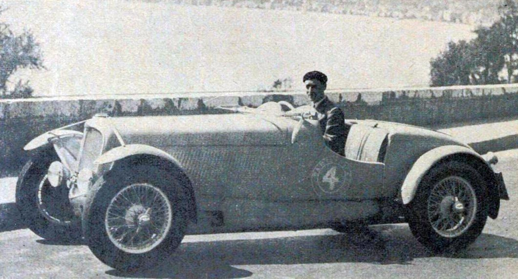 Laury Schell sur Delahaye 18CV Sport, à Nice après sa victoire au Critérium Pari-Nice 1936.